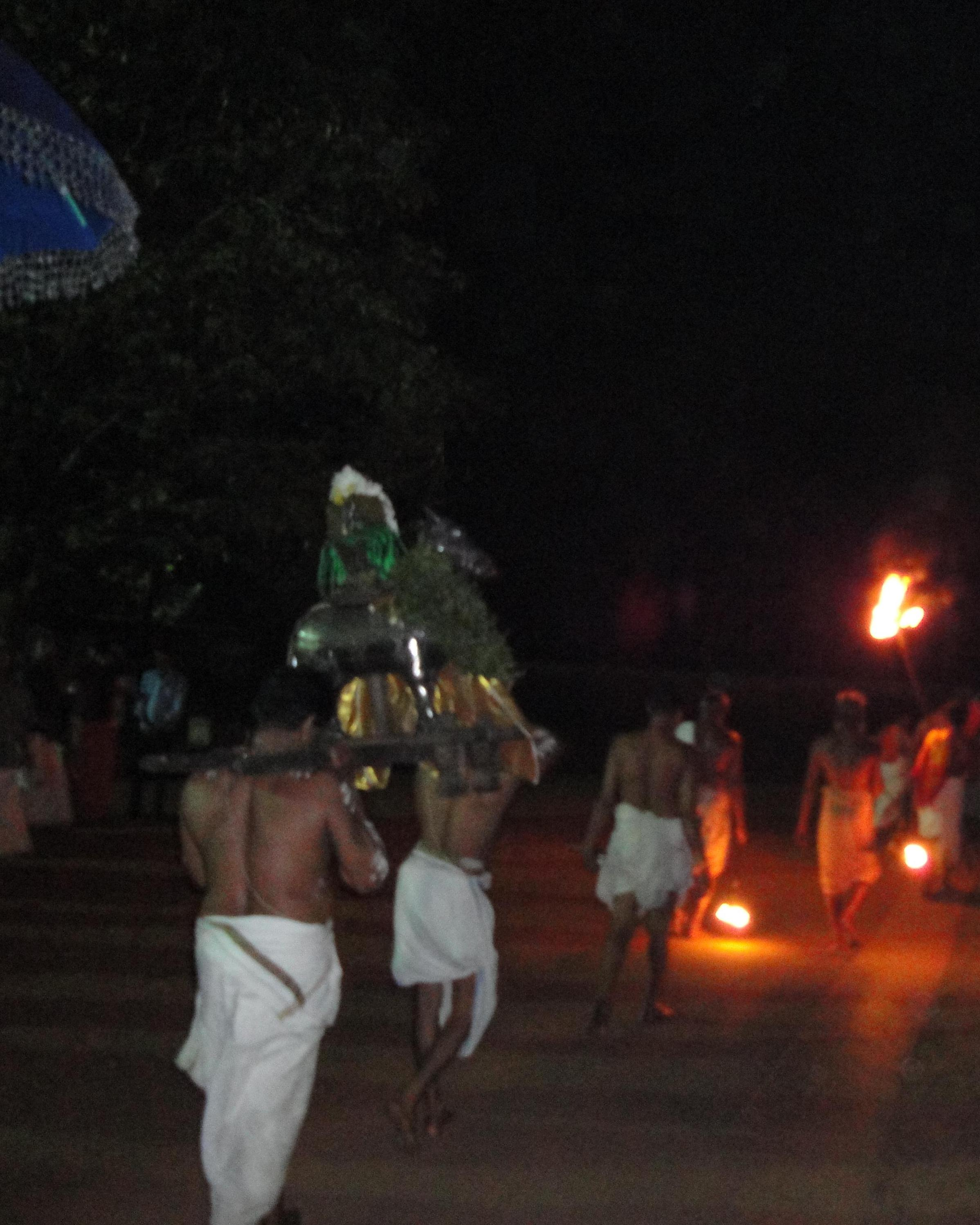 പ്രദോഷം എഴുന്നള്ളത്ത്